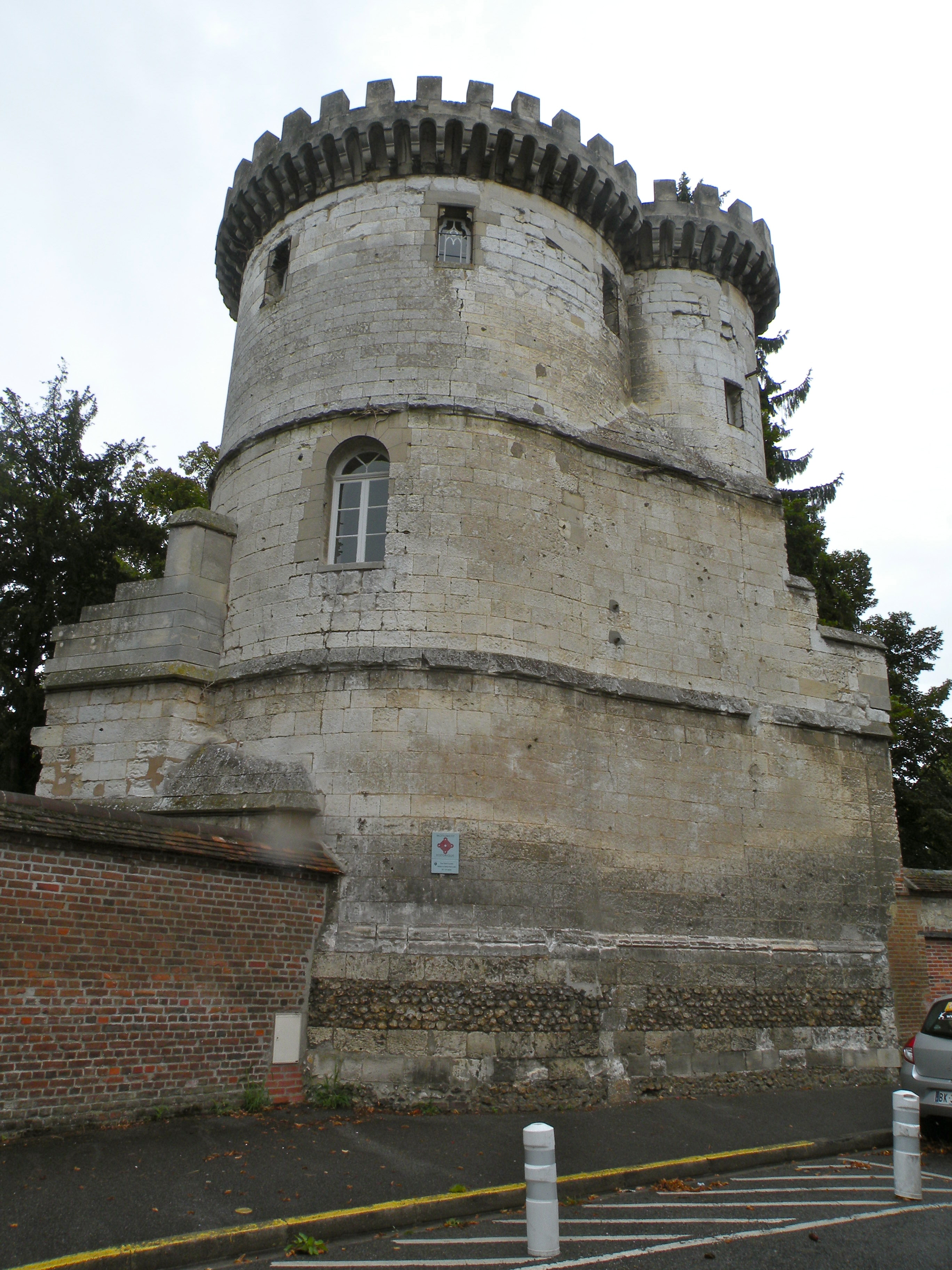 tour de l'Abbaye Saint-Lucien de Beauvais classé monument historique